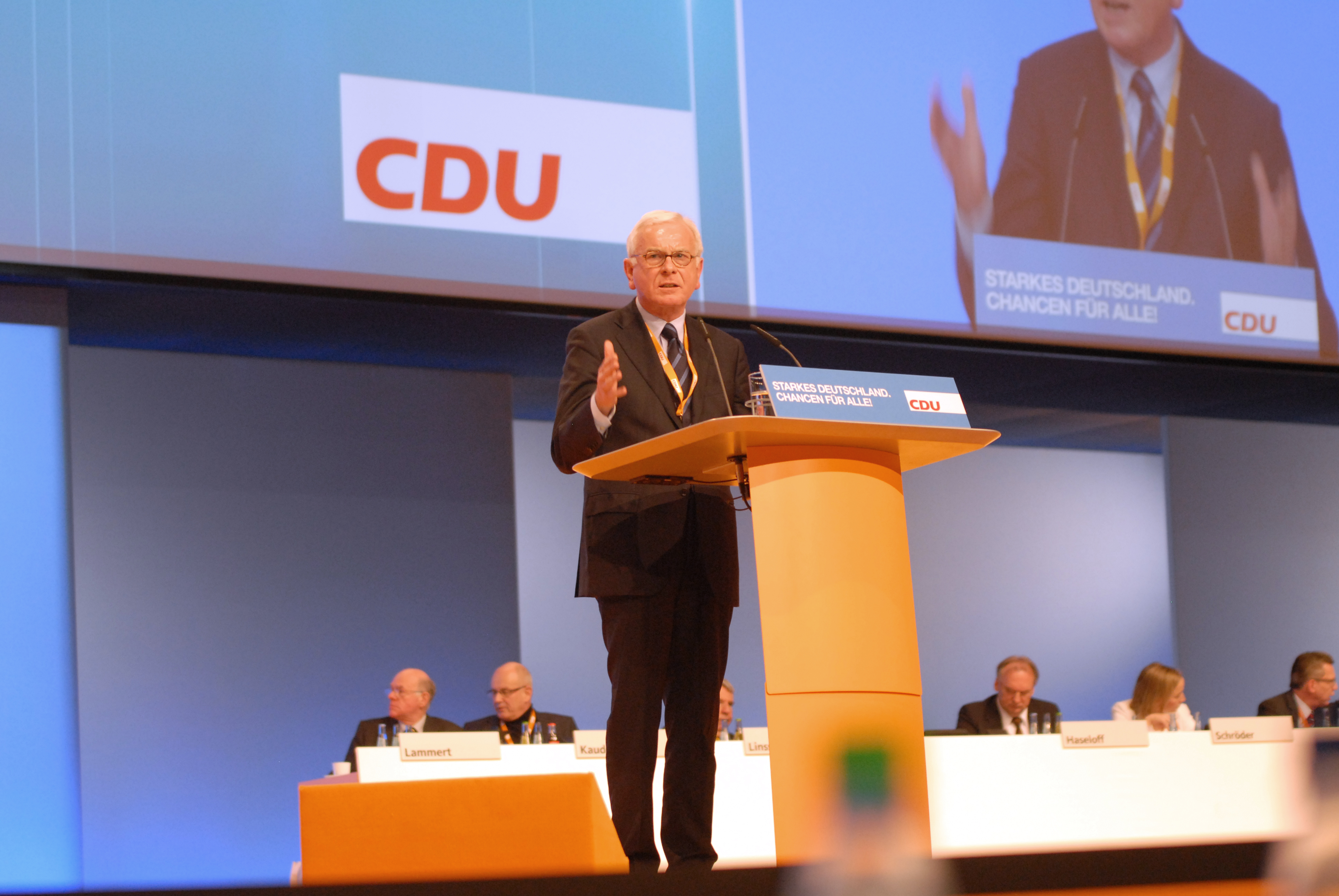 Hans-Gert Pööterin, Vorsitzender der Konrad-Adenauer-Stiftung